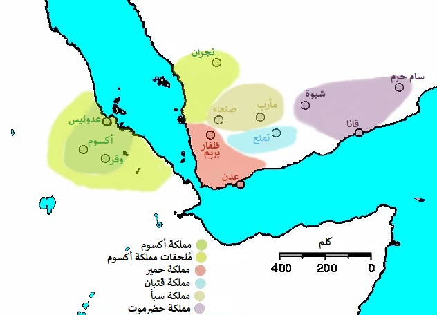 خريطة لِمملكة أكسوم الحبشيَّة وممالك جنوب شبه الجزيرة العربيَّة حوالي سنة 230م خلال أواخر عهد النجاشي جدارات.